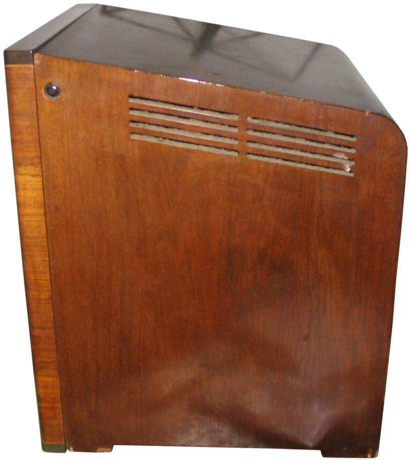 Philips-Fernseher TD1410U ("Starenkasten") von 1952, Seitenansicht